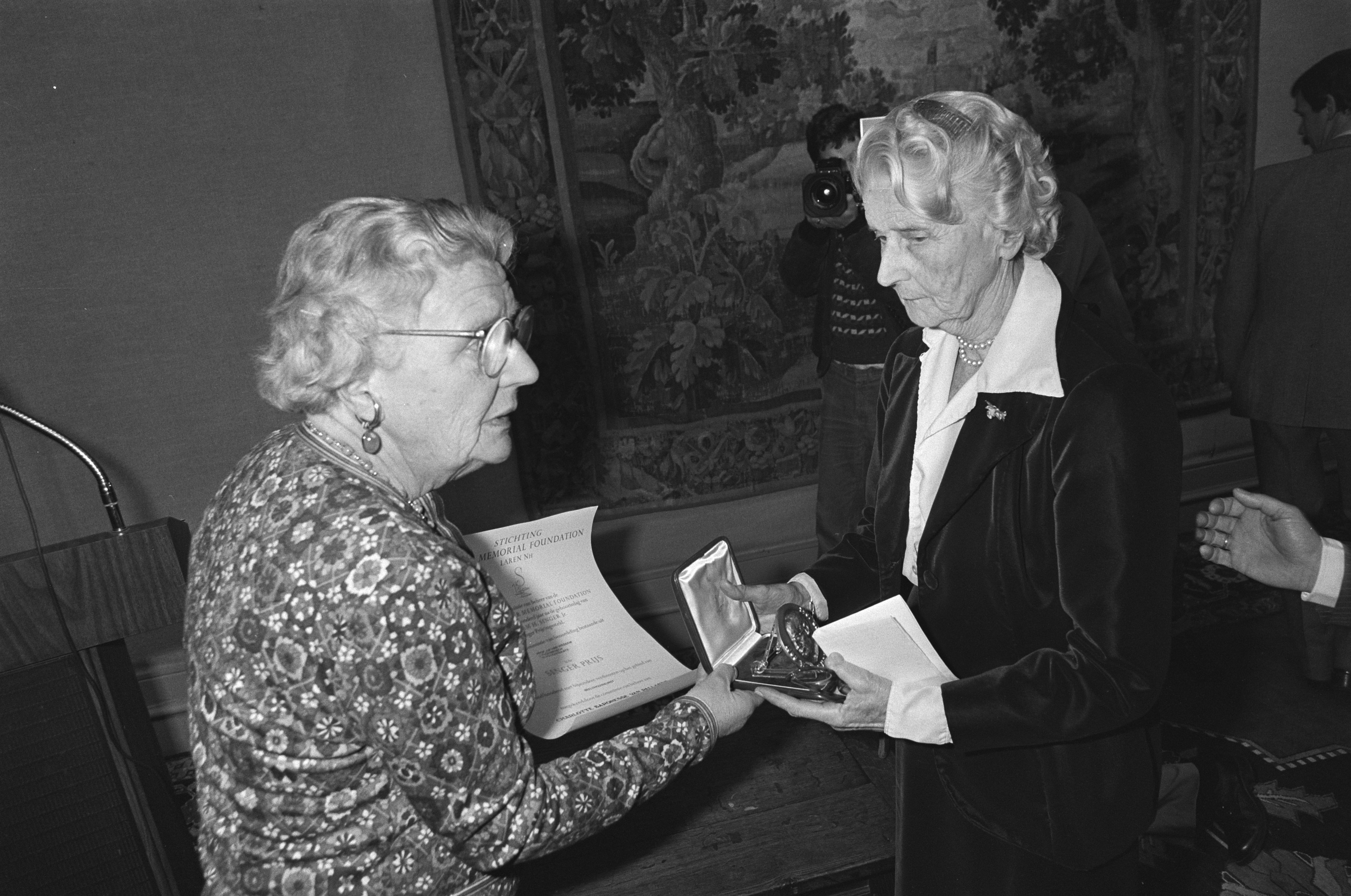 In Singermuseum Laren rijkt prinses Juliana de Singerprijs 1980 uit aan beeldhouwster Charlotte van Pallandt